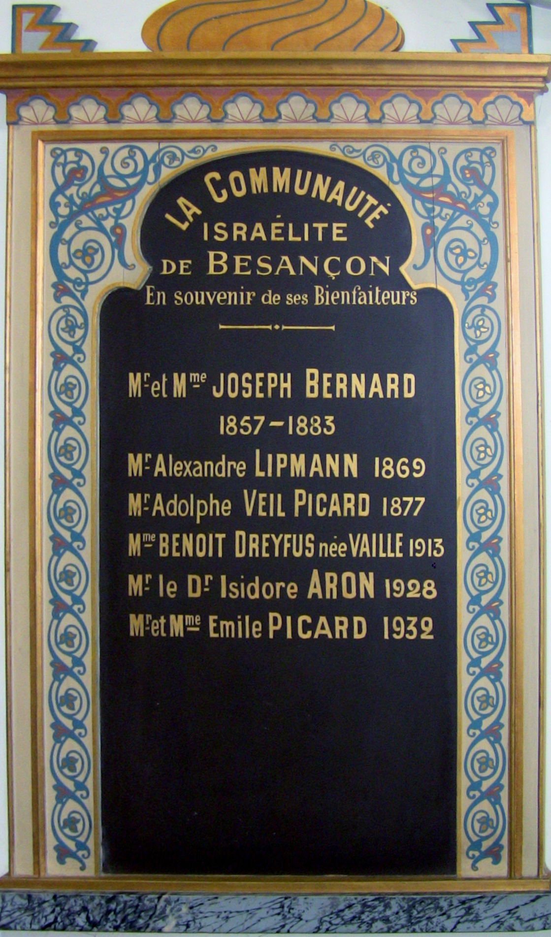 Plaque des bienfaiteurs Juifs de la Synagogue de Besançon.